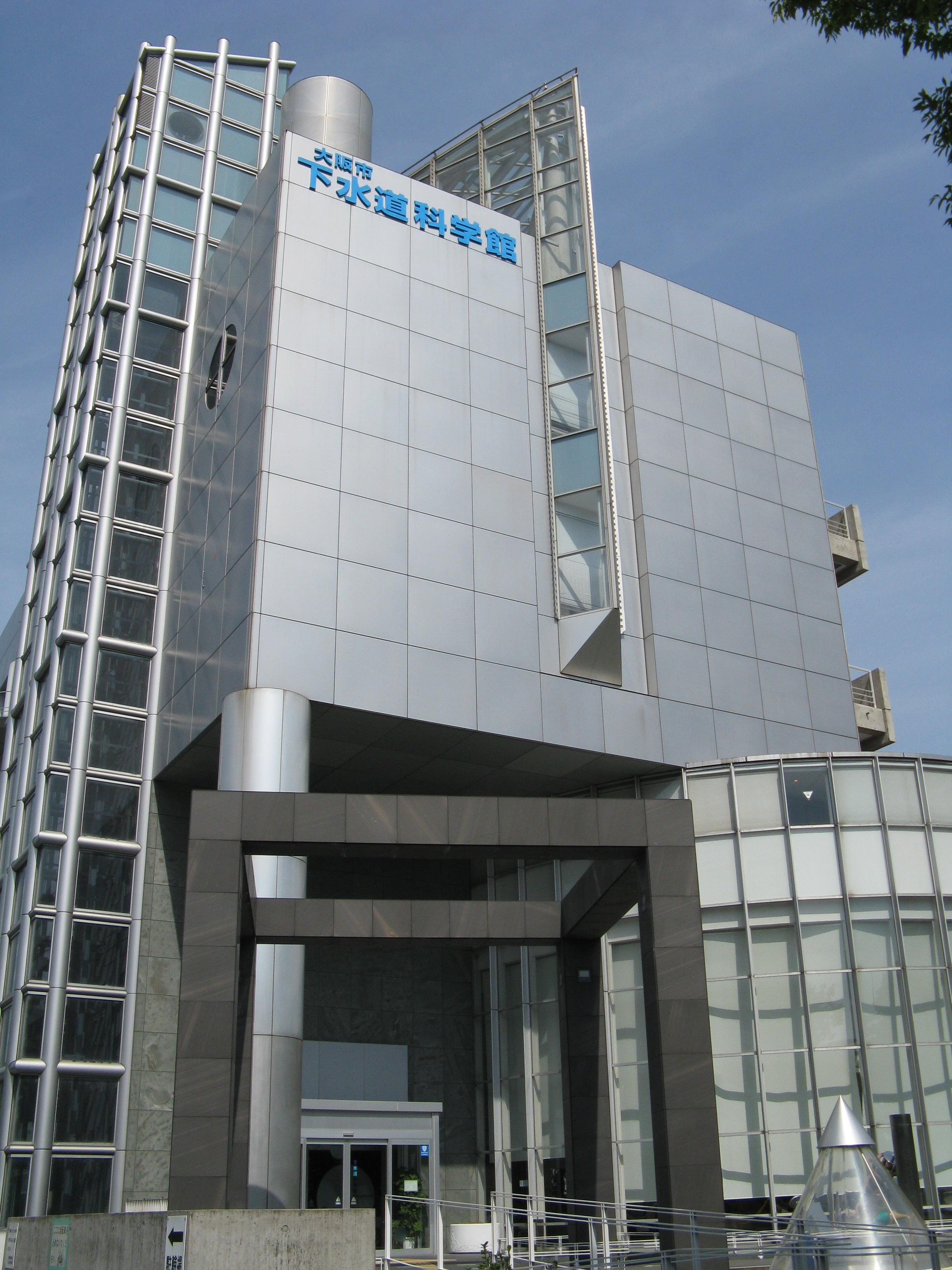 大阪市下水道科学館